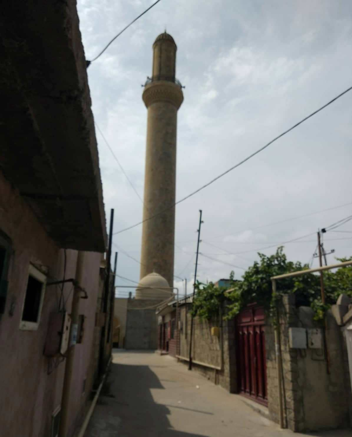 Maştağa məscidinin minarəsi